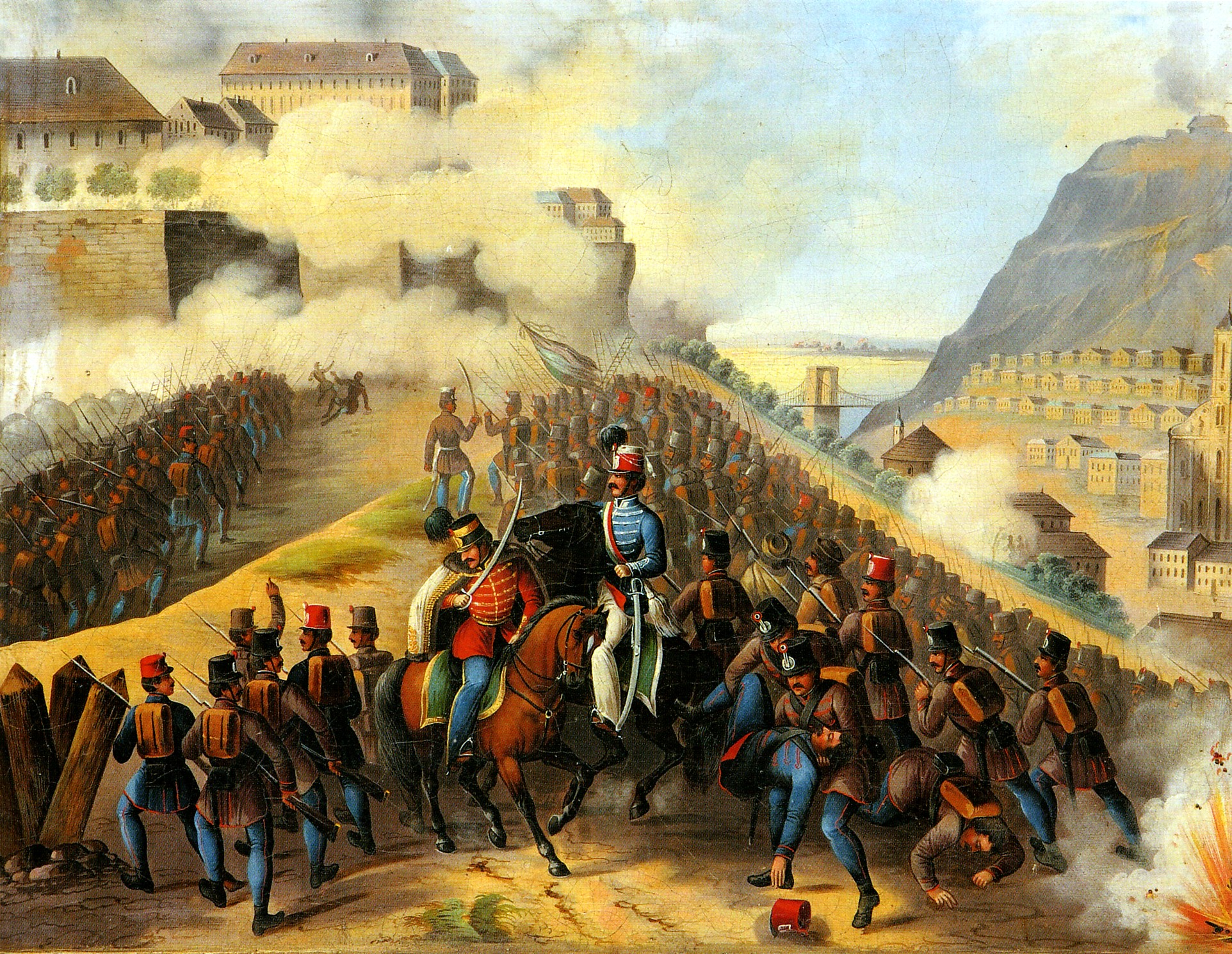 Hungarian: Buda ostroma 1849-ben. Ismeretlen művész olajfestménye.label QS:Lhu,"Buda ostroma 1849-ben. Ismeretlen művész olajfestménye."